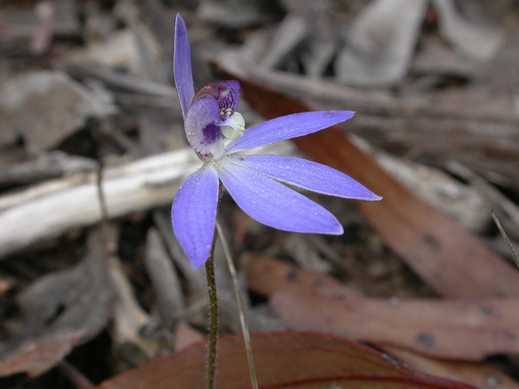 Caladenia fuscata (Rchb.f.) M.A.Clem. & D.L.Jones, Black Mountain, Canberra, ACT, 20 September 2010